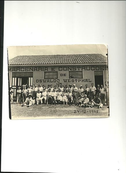 Tradicional festa de natal da Marcenaria e Construções de Oswaldo Westphal, em 24 de dezembro de 1948